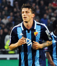 Djurgårdens IF Player Erton Fejzullahu.